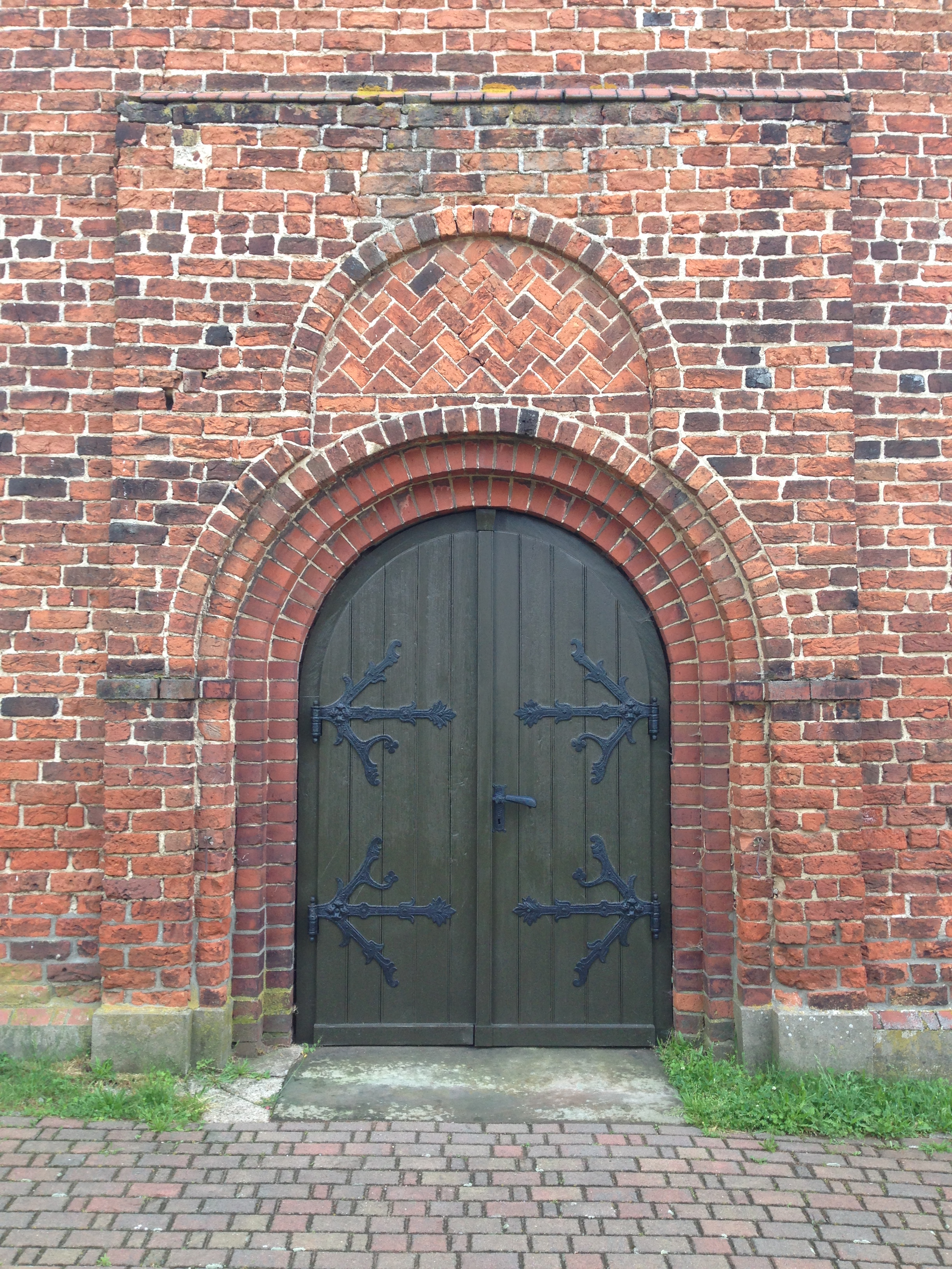 Dorfkirche Neuenklitsche, Westportal mit vierfacher Abstufung und Überfang-Blendbogen. Portal nach Restaurierung der Türflügel im Mai 2015